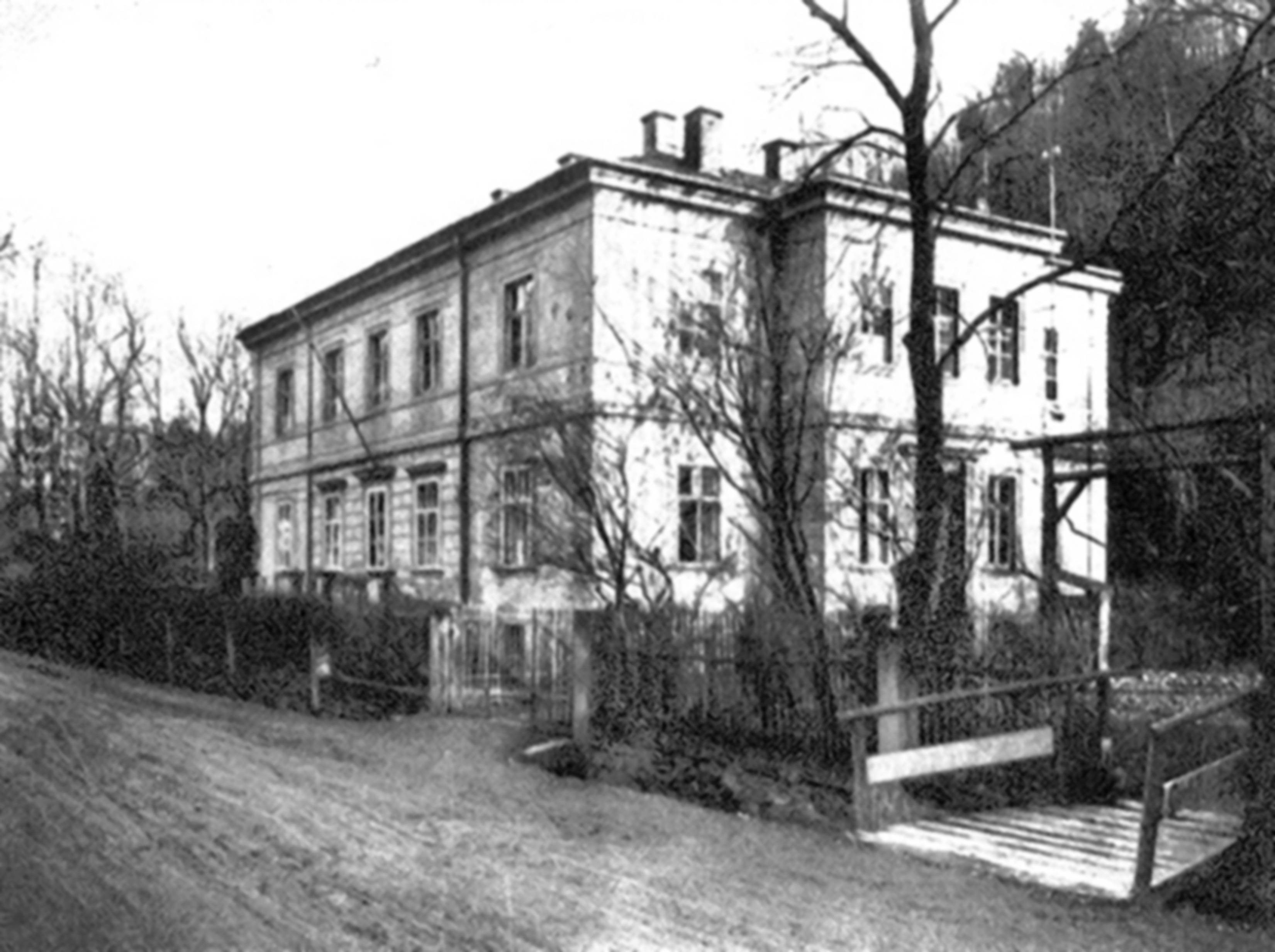 ehemaliges Firmengebäude in Glashuette